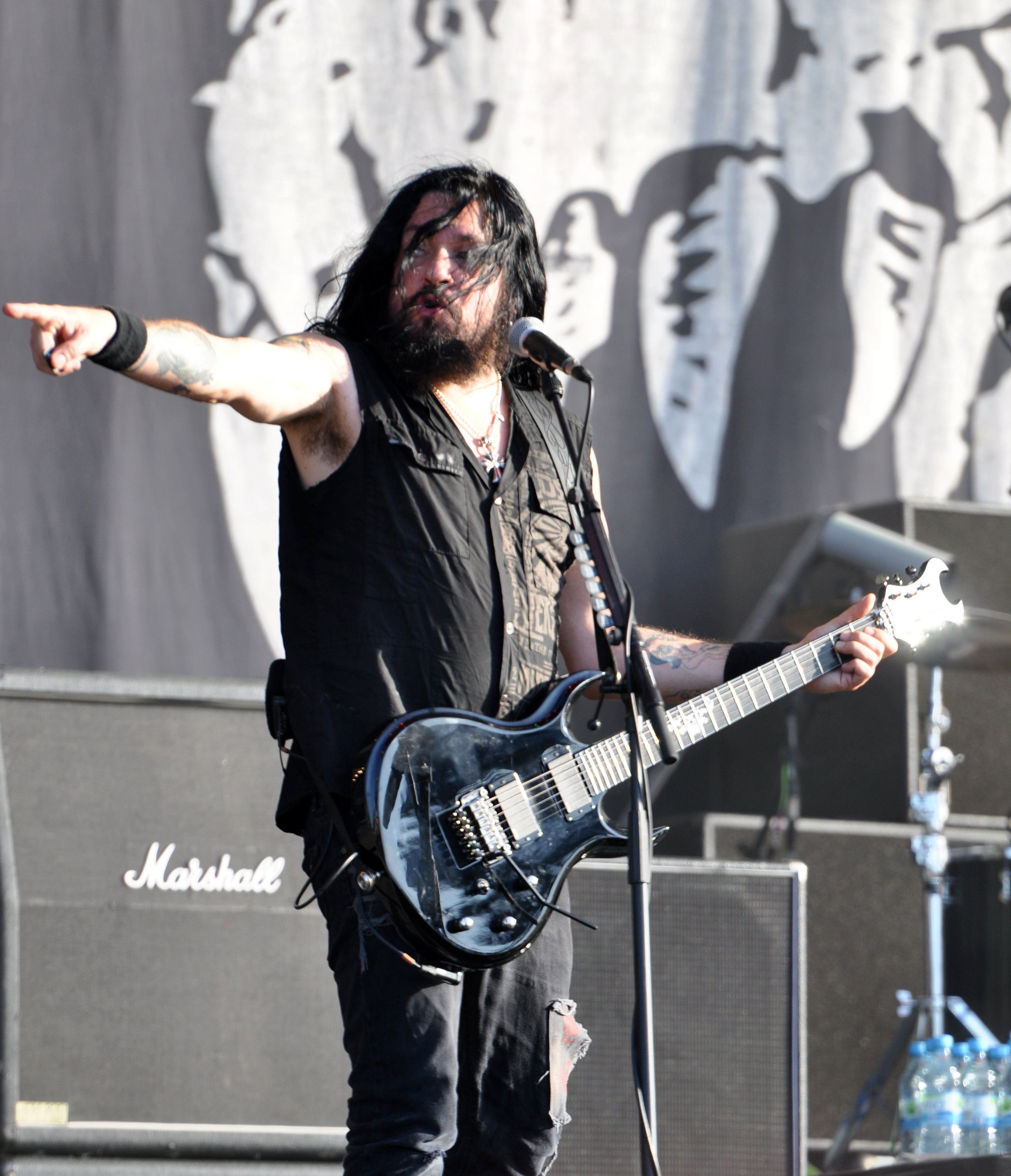 Danzig at Wacken Open Air 2013